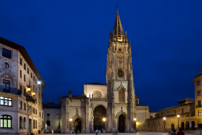 Vista nocturna de la catedral de Oviedo.